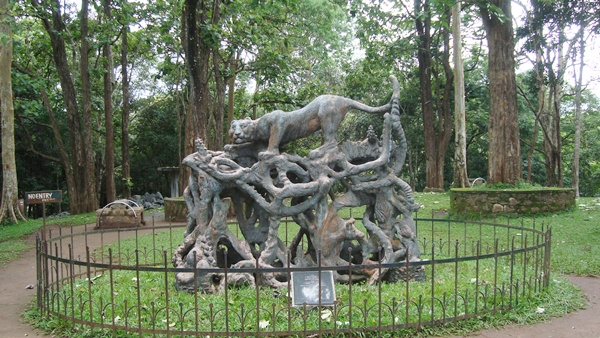 தேக்கடி பூங்கா படம்